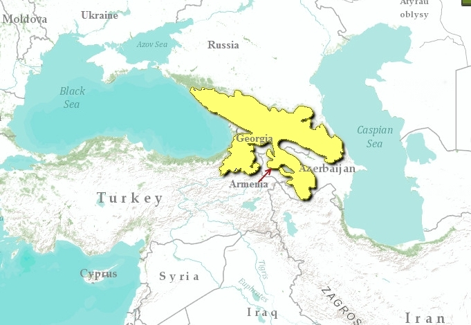 Mappa Ecoregione PA0408 - Foreste miste caucasiche